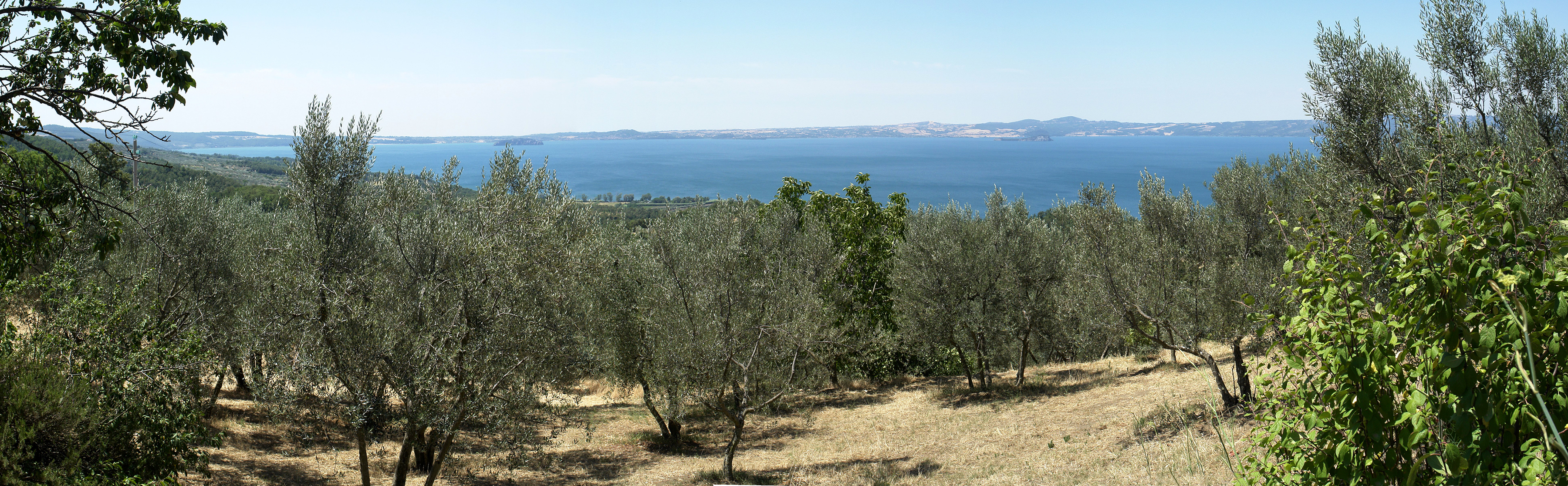 Bolsenasee (Panorama Südhälfte, Blick auf Bolsena)